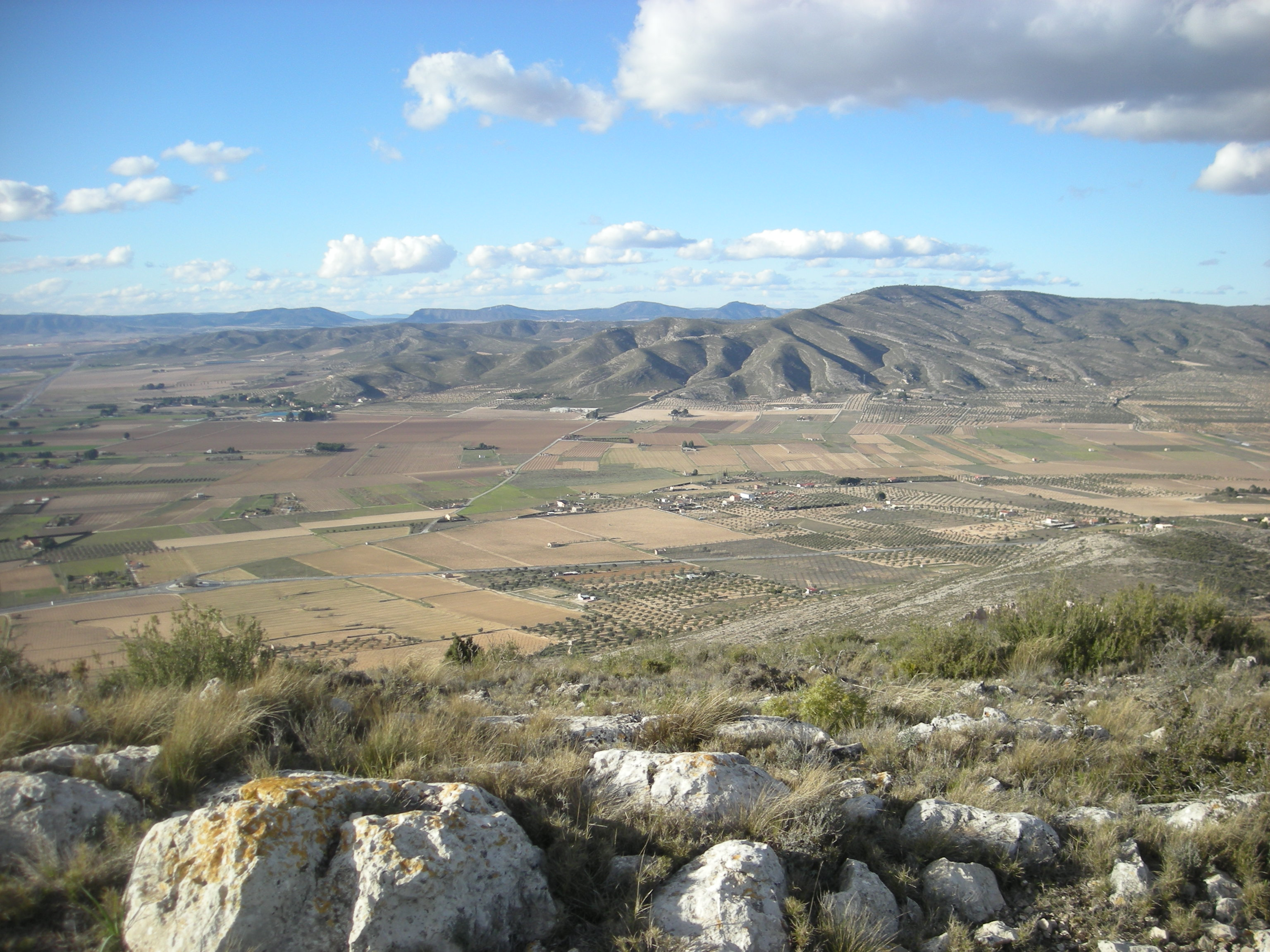 Vista de la partida de Cascante (Villena), en el Valle de Benejama, desde la Sierra de la Villa o de San Cristóbal. Al fondo la Sierra del Morrón.